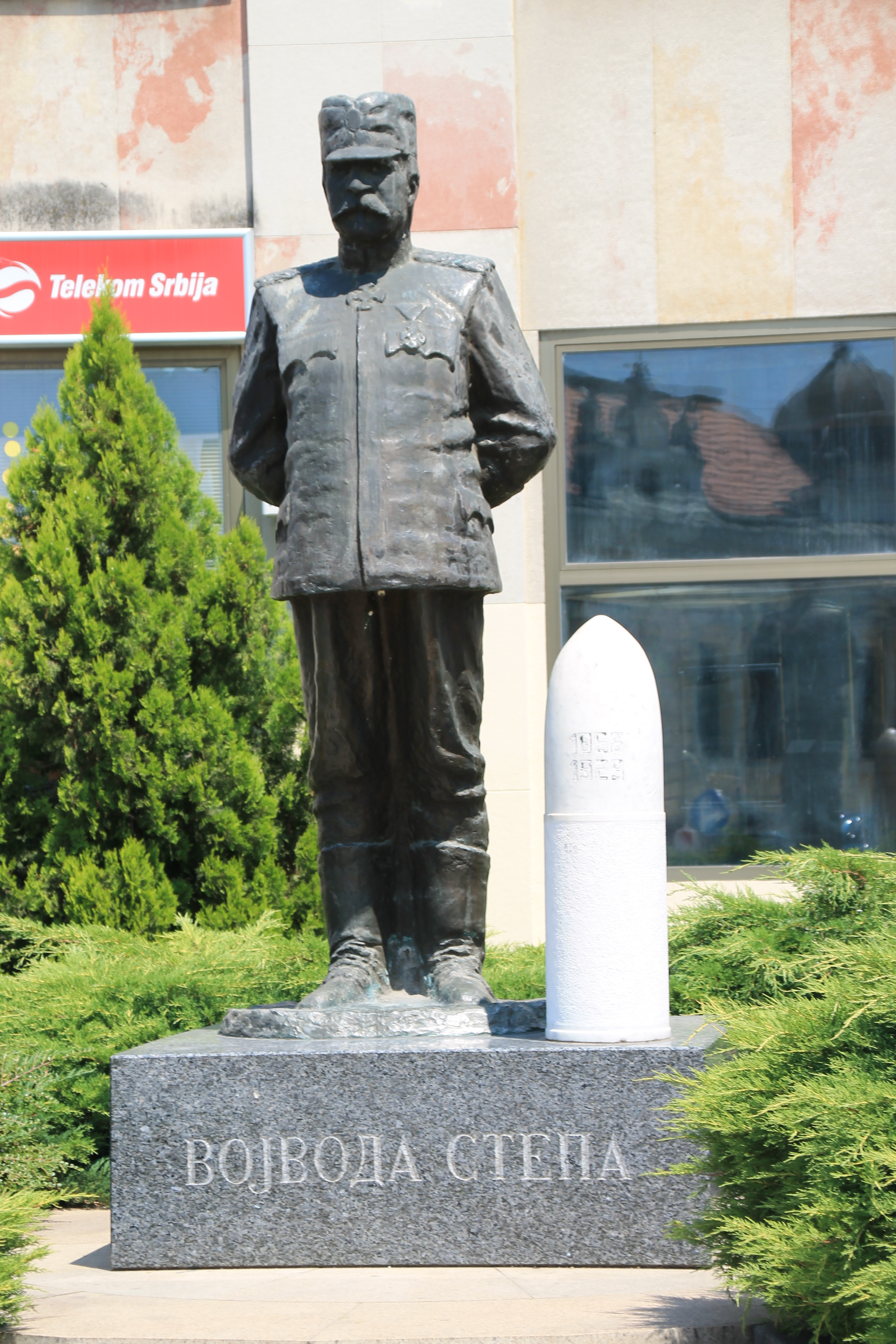 Gradsko jezgro Čačka